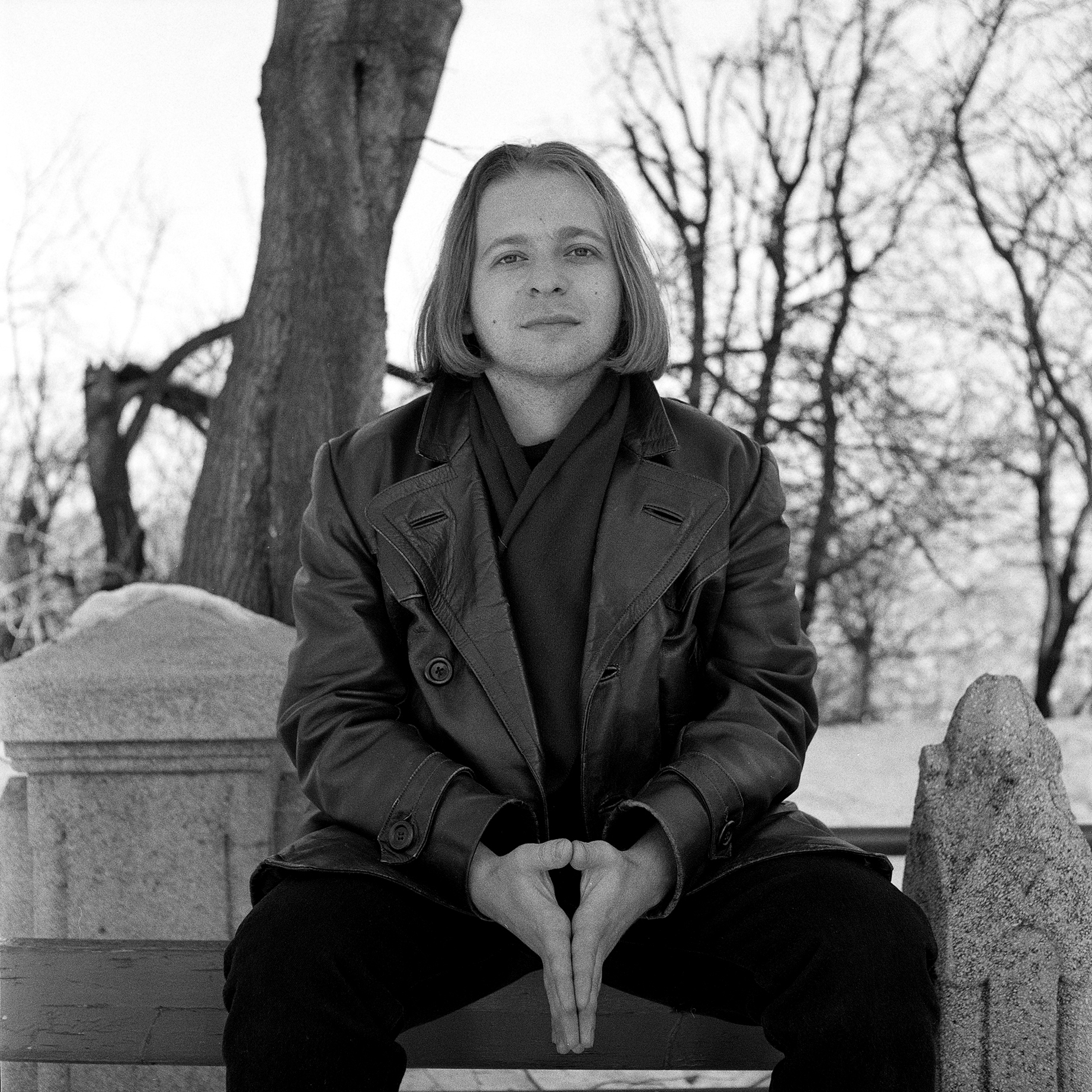 Hazai Attila (Budapest, 1967. április 30. – 2012. április 5.) magyar prózaíró, műfordító.